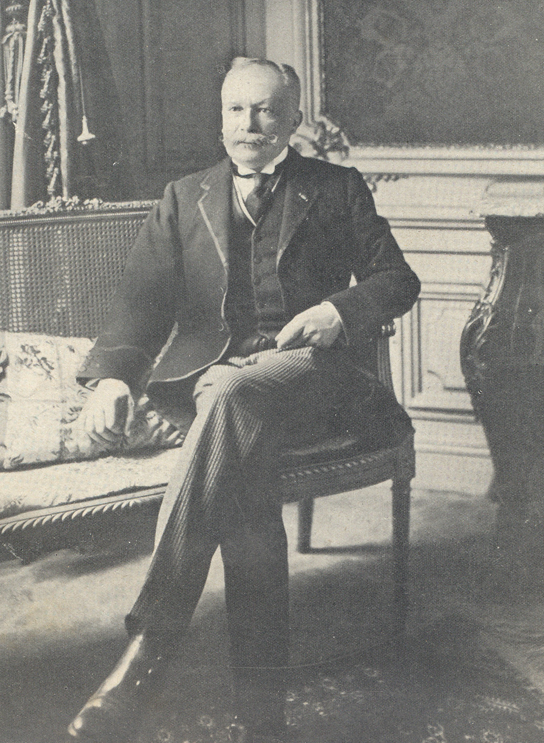 Reneke de Marees van Swinderen